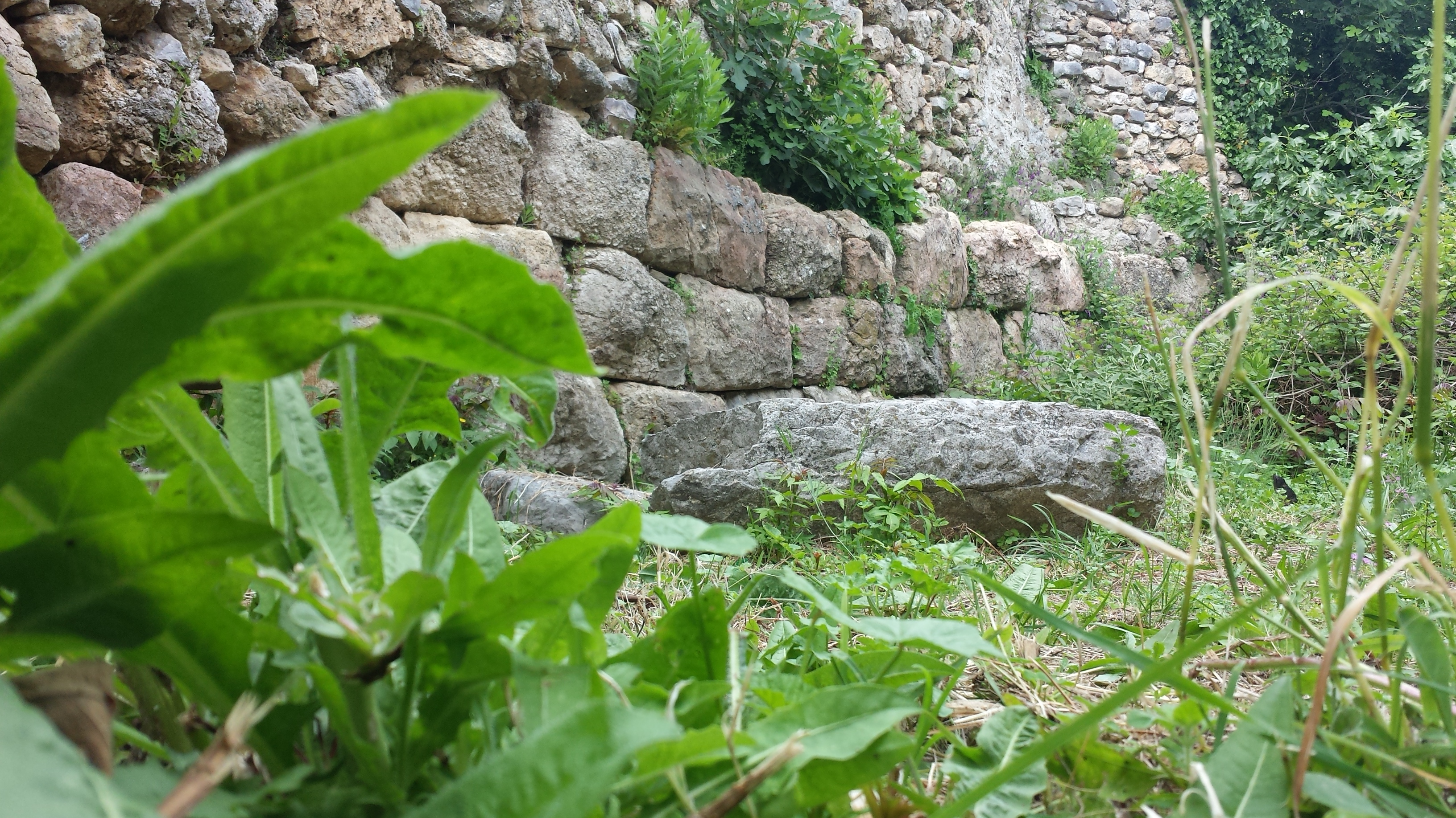 Muri ciklopik në Kalanë e Ulqinit.